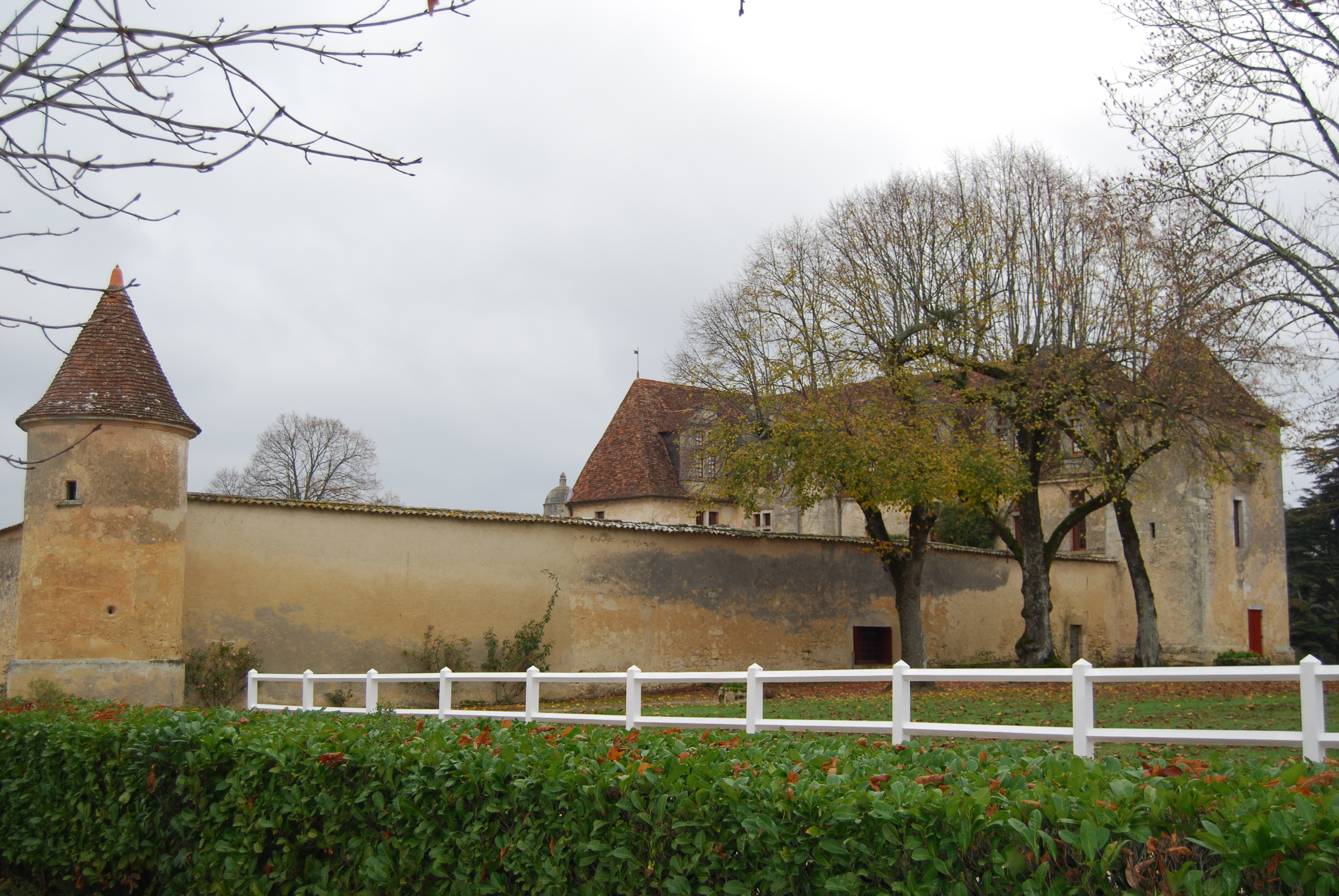 Château du Grand Verdus, (Inscrit, 1978) .